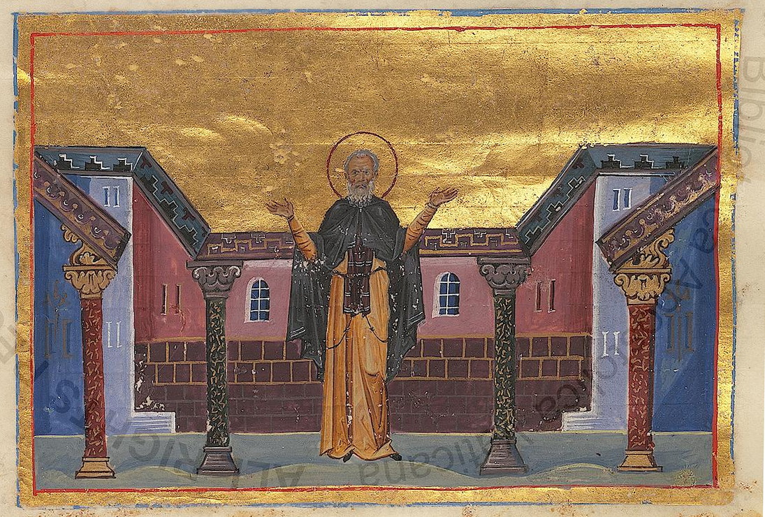 Преподобный Кириак Константинополь. 985 г. Миниатюра Минология Василия II. Ватиканская библиотека. Рим.